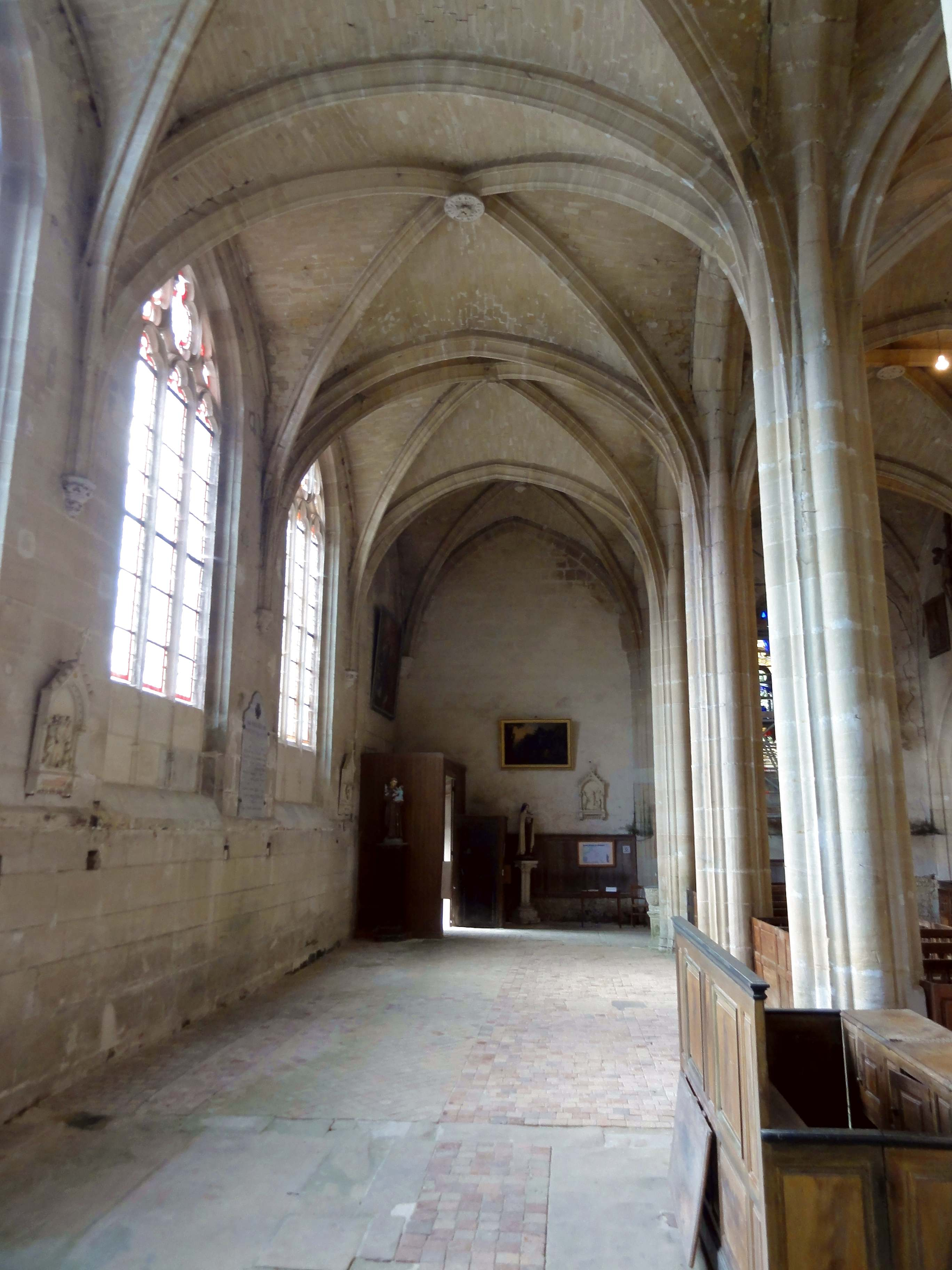 Intérieur de l'église - voir le titre du fichier.